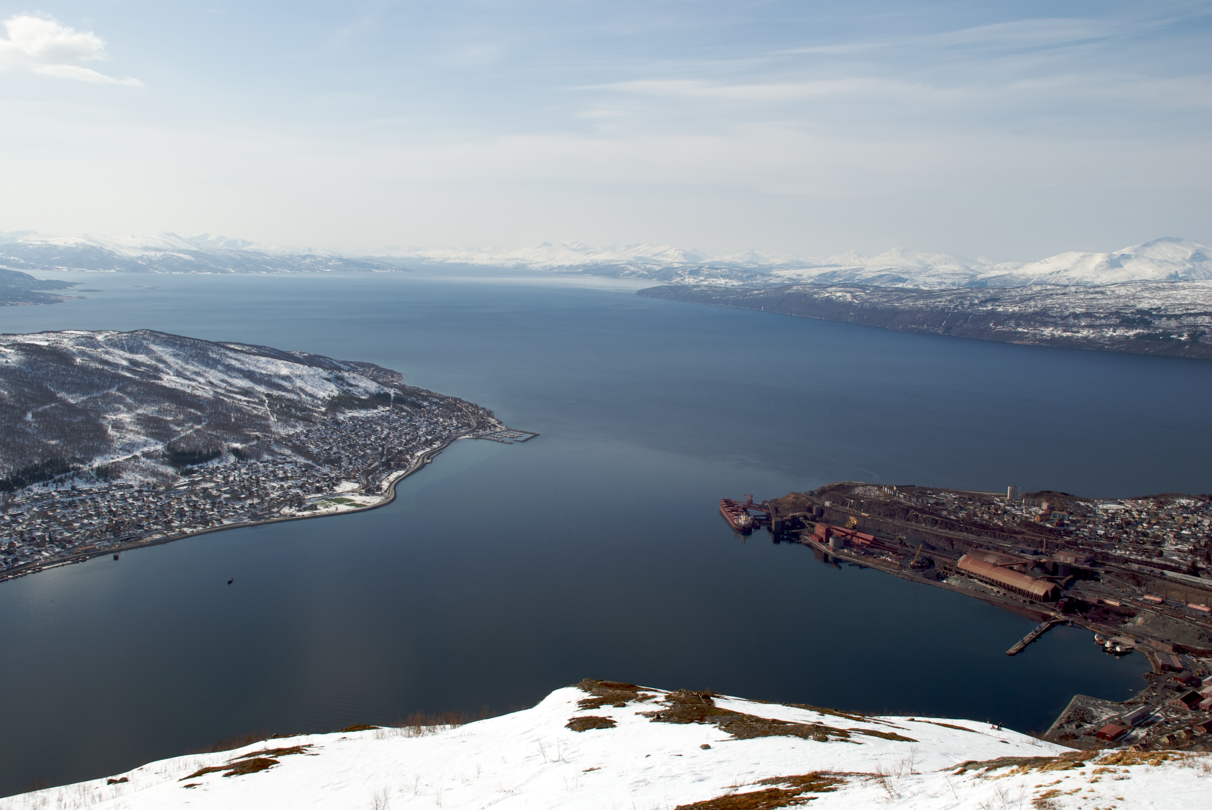 Utsikt frå Fagernesfjellet i Narvik kommune